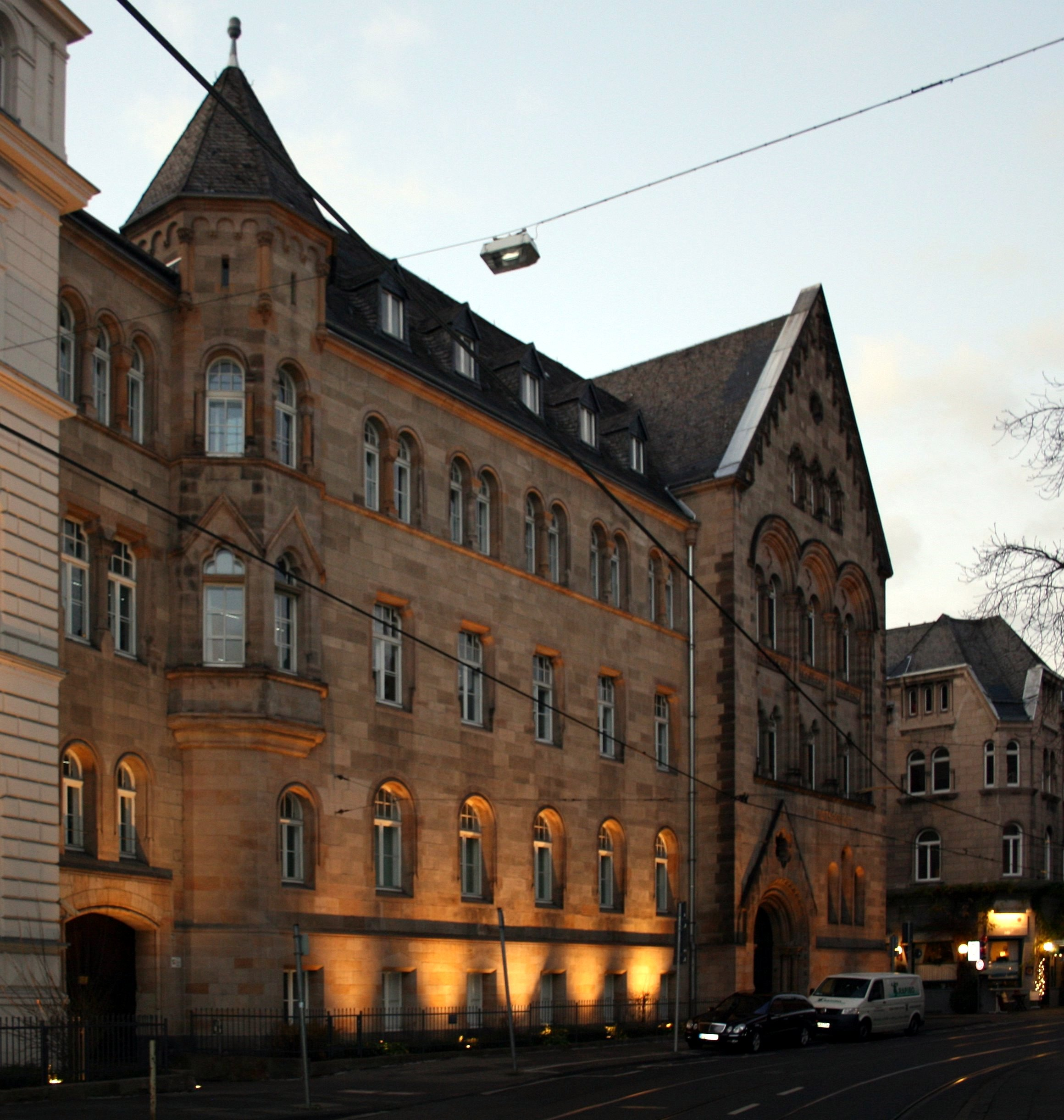 Amtsgericht in Bonn (Wilhelmstraße 21)